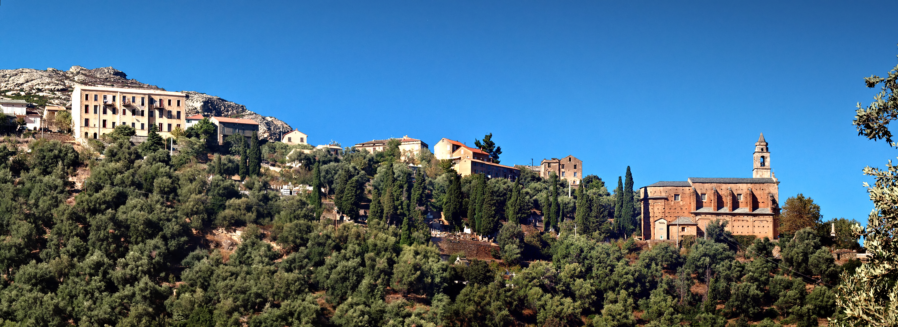 Santo-Pietro-di-Tenda (Corsica) - Vue du village et de l'église San Giovanni Evangelista